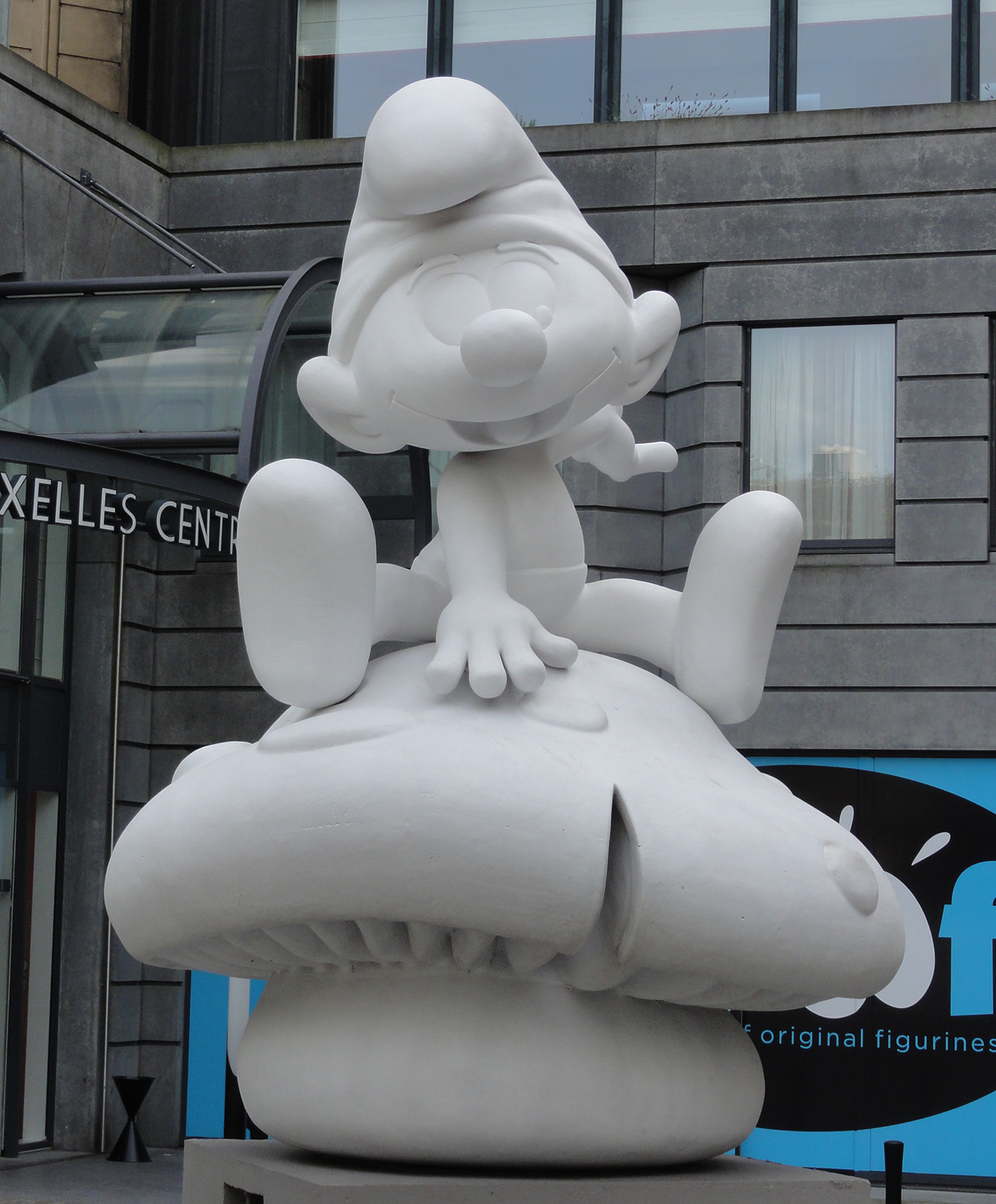 Smurf